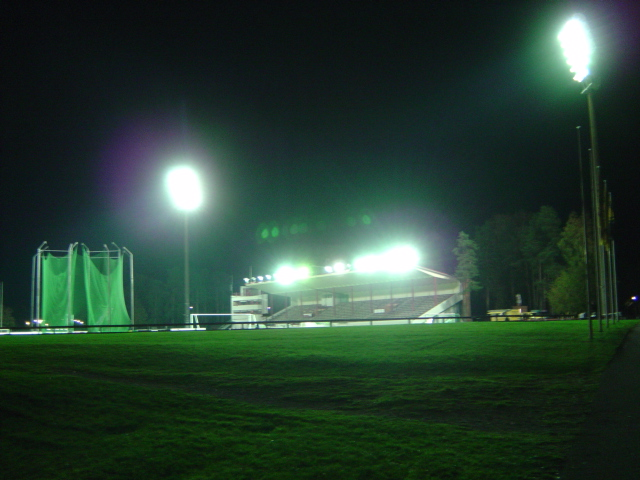 Vänärin pääkatsomo